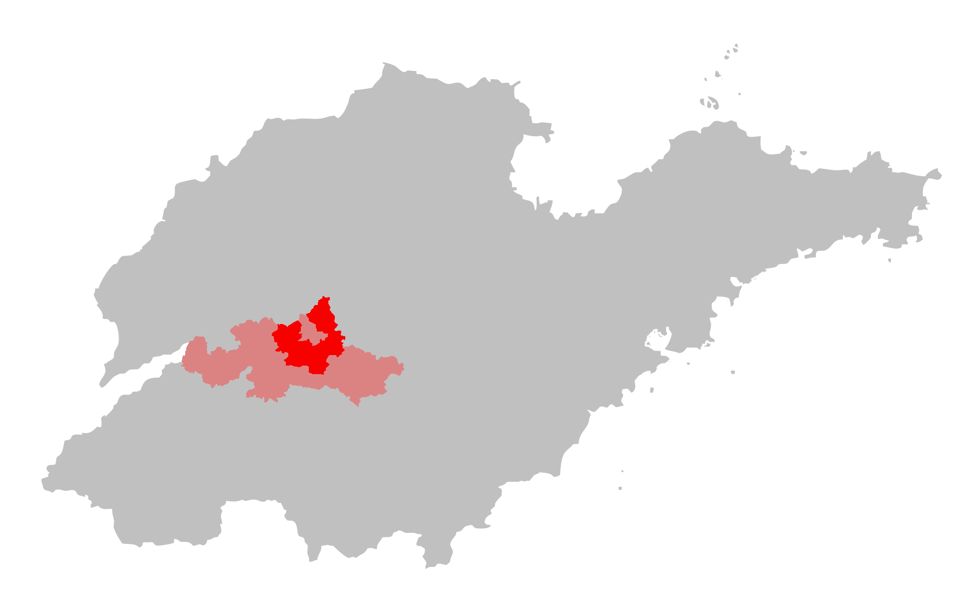 中文（中国大陆）: 岱岳区在山东省的位置，参考天地图·山东制作